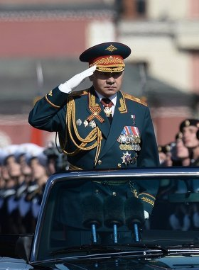 Генерал армии С. К. Шойгу на Параде Победы 9 мая 2014 года, Красная площадь